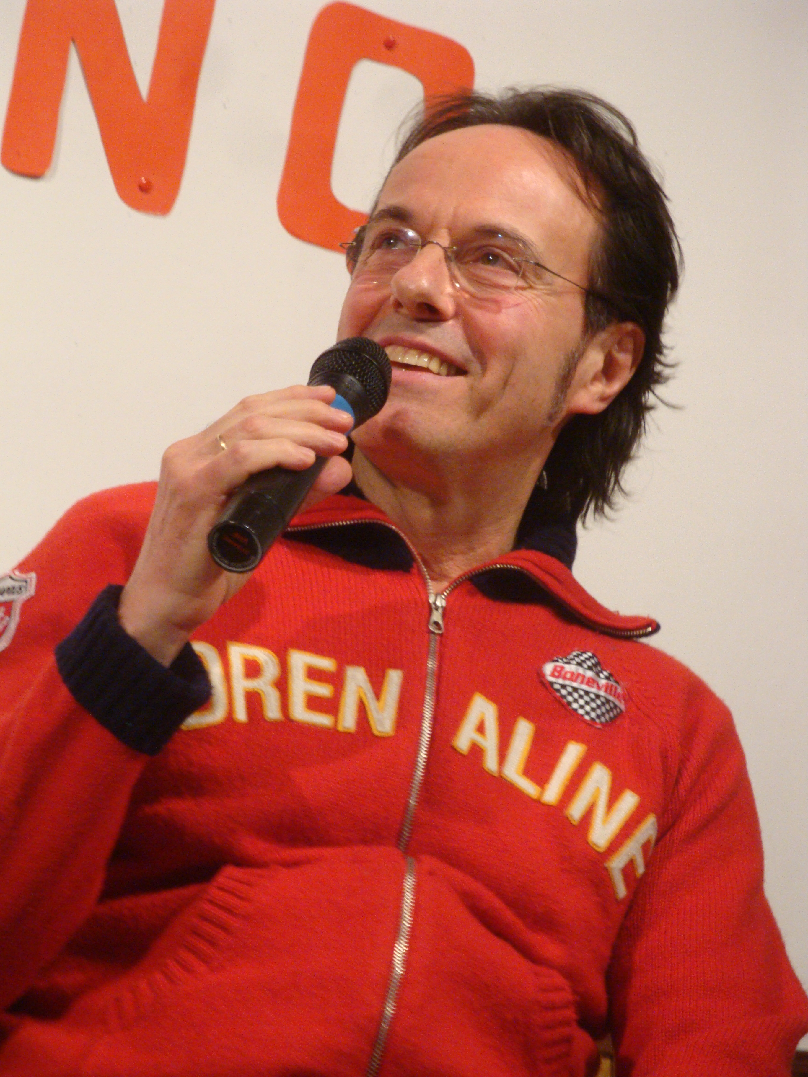 Autore: Tony Frisina - Alessandria